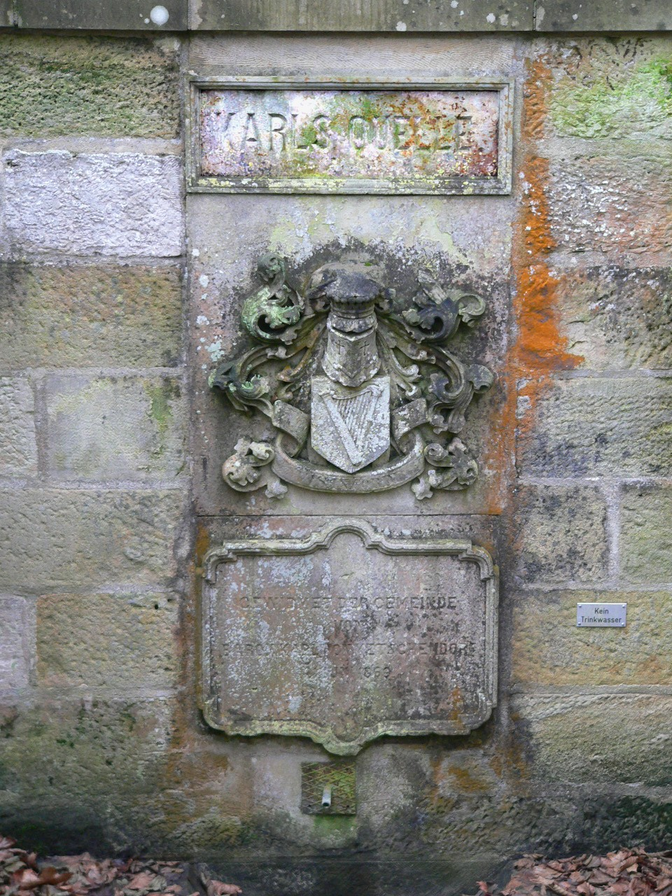 Karlsquelle im Park von Schloss Ketschendorf (Coburg) mit Wappen der von Stolzenau-Ketschendorf